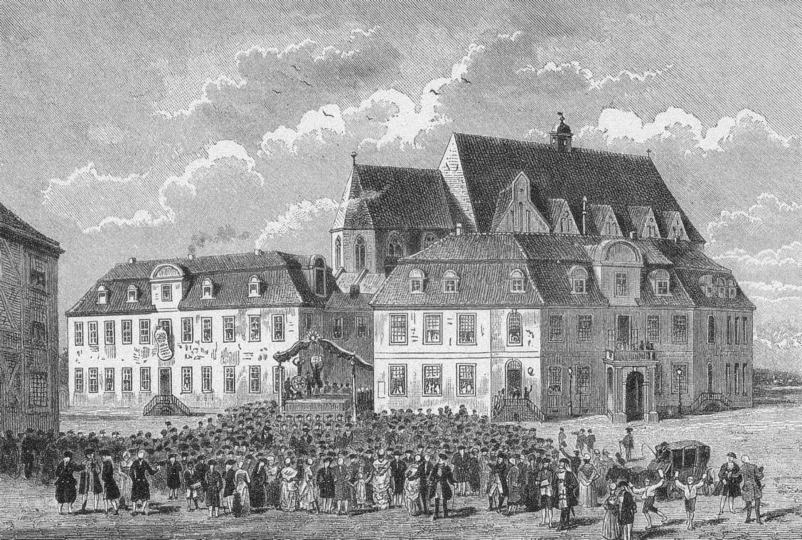 Lotto auf dem Ägidienmarkt in Braunschweig.